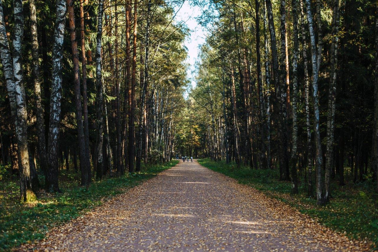 Парк мещерский